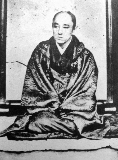 a Japanese man 山内容堂 (Yodo Yamauchi)